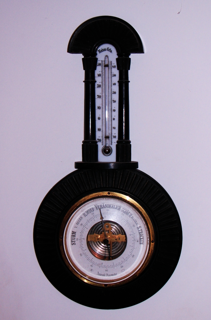 Barometer und Thermometer